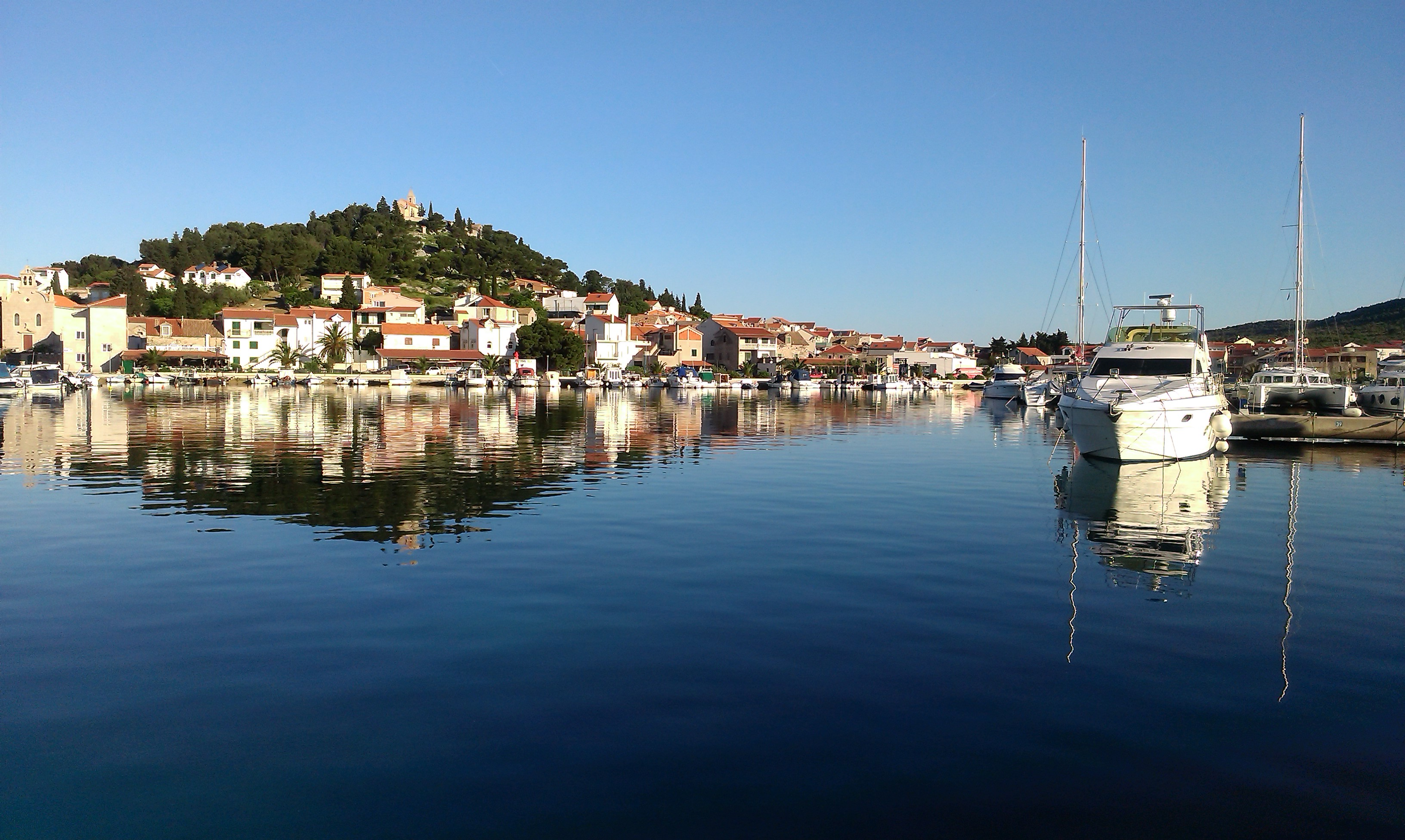 Tribunj